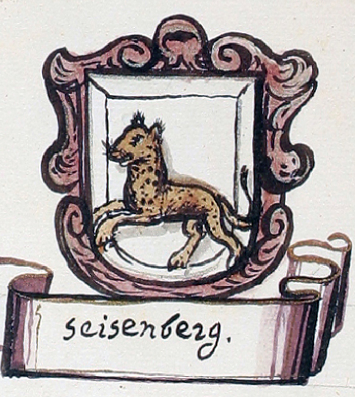 Žužemberk grb